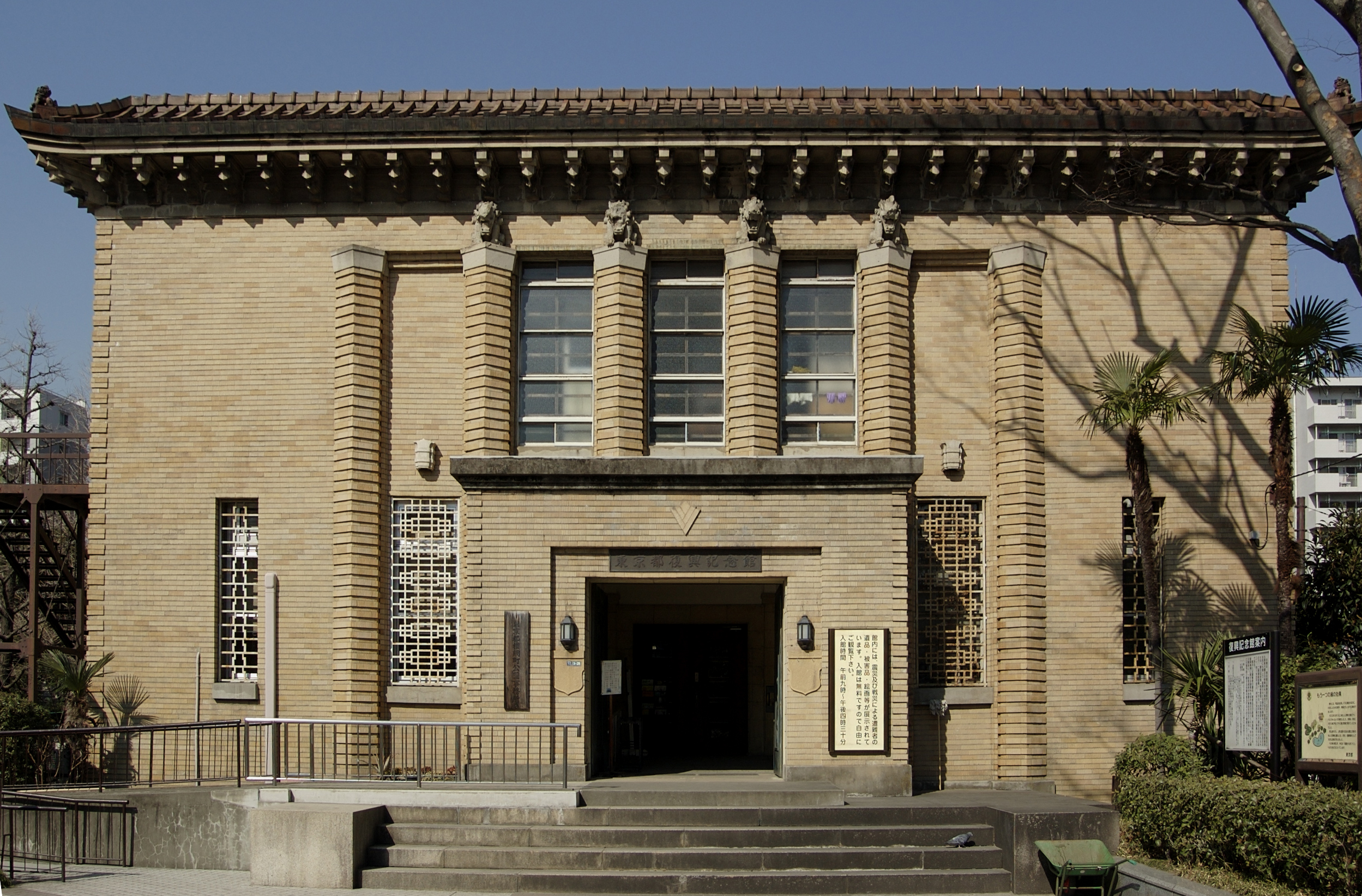 hukkou kinenkan at Ryogoku, Tokyo, Japan. Architect by Chuta Ito.